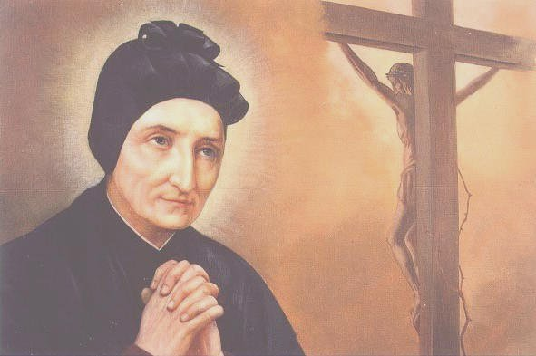 Représentation de Madeleine de Canossa